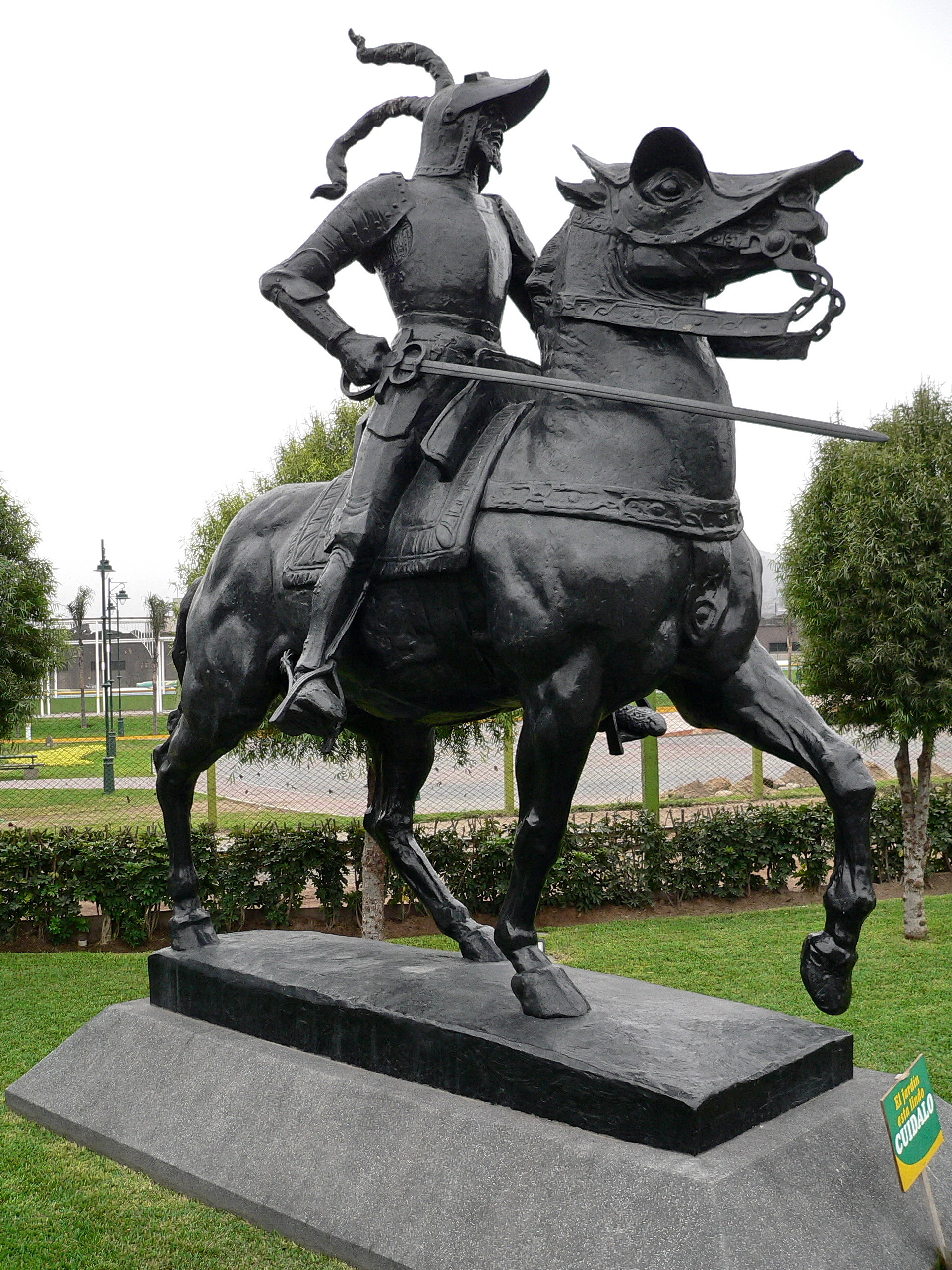 EStatua de Francisco Pizarro en Lima